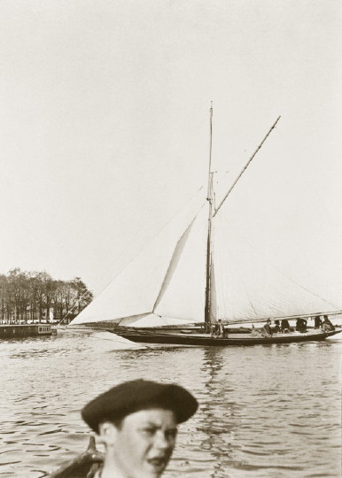 Jeune garçon, voilier au petit Gennevilliers. Photo par Martial Caillebotte.